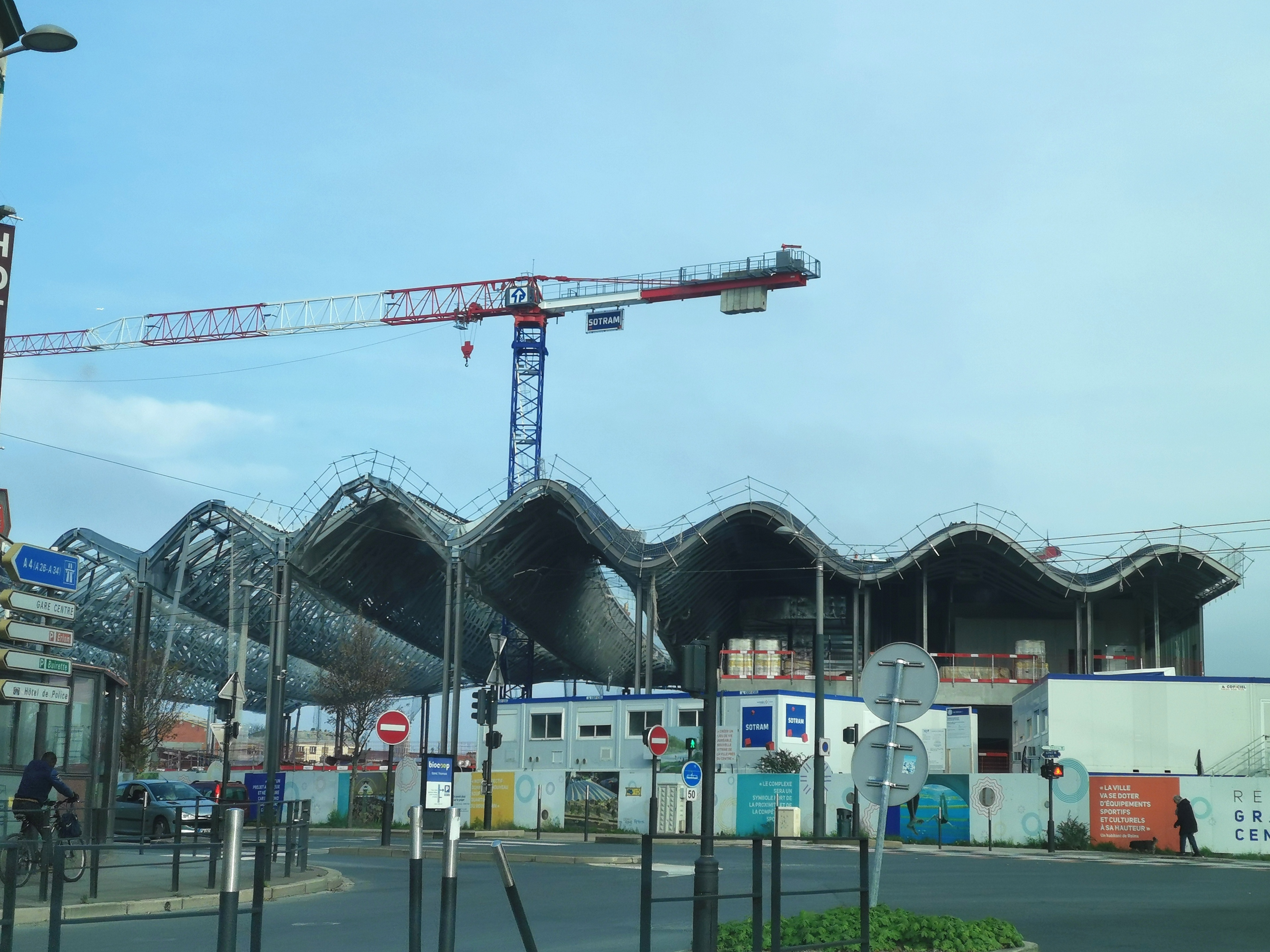 Le complexe aqualudique de Reims en novembre 2019